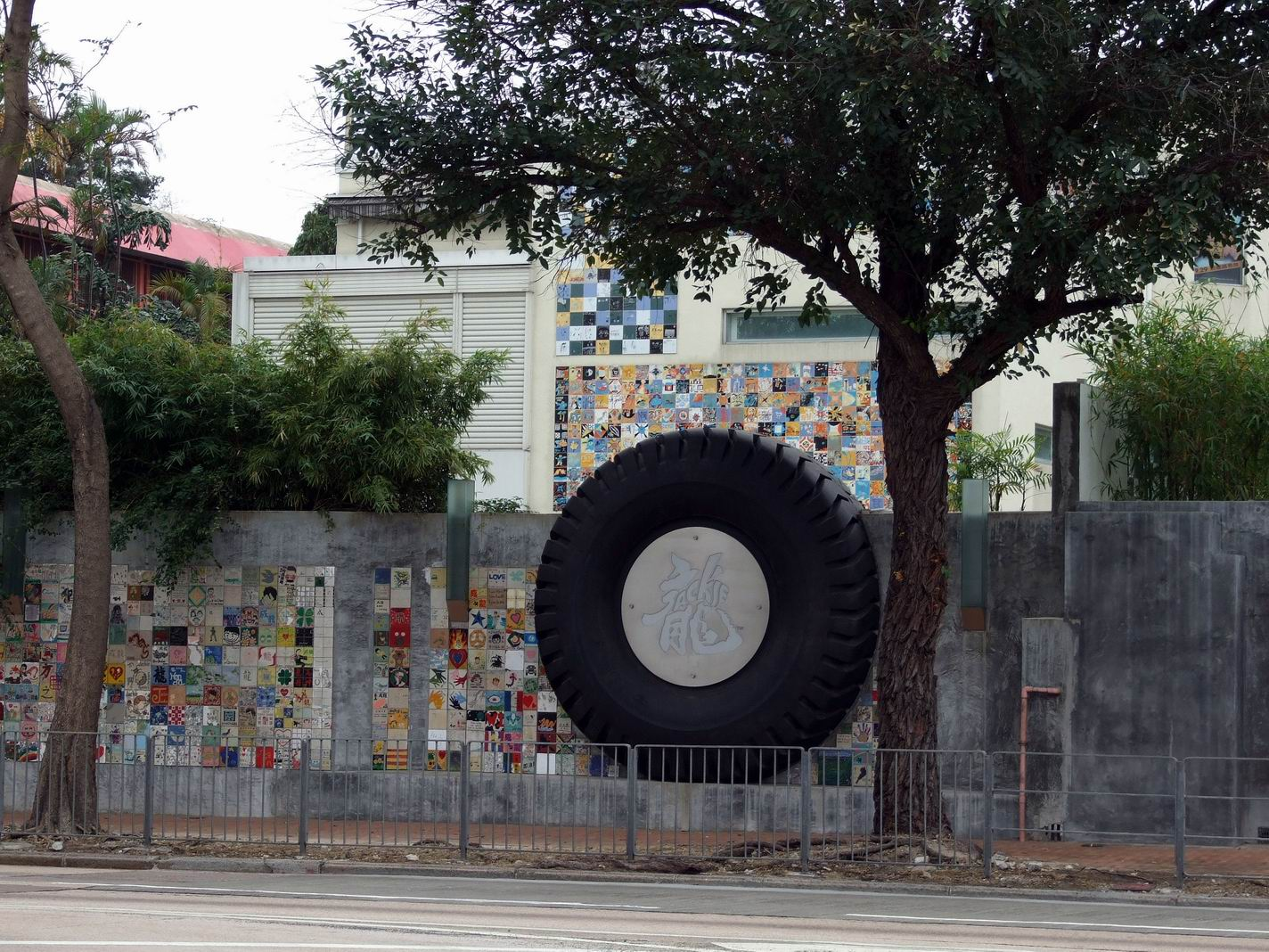 成龍位於九龍塘的製作公司